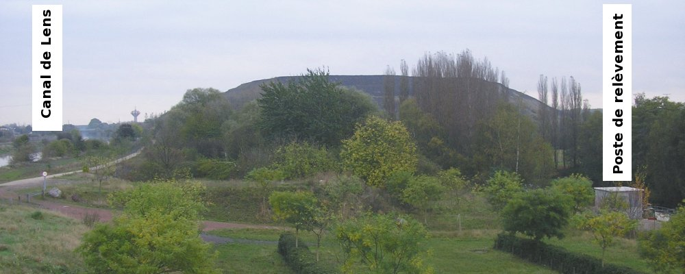 Station de relèvement en zone d'affaissement minier.